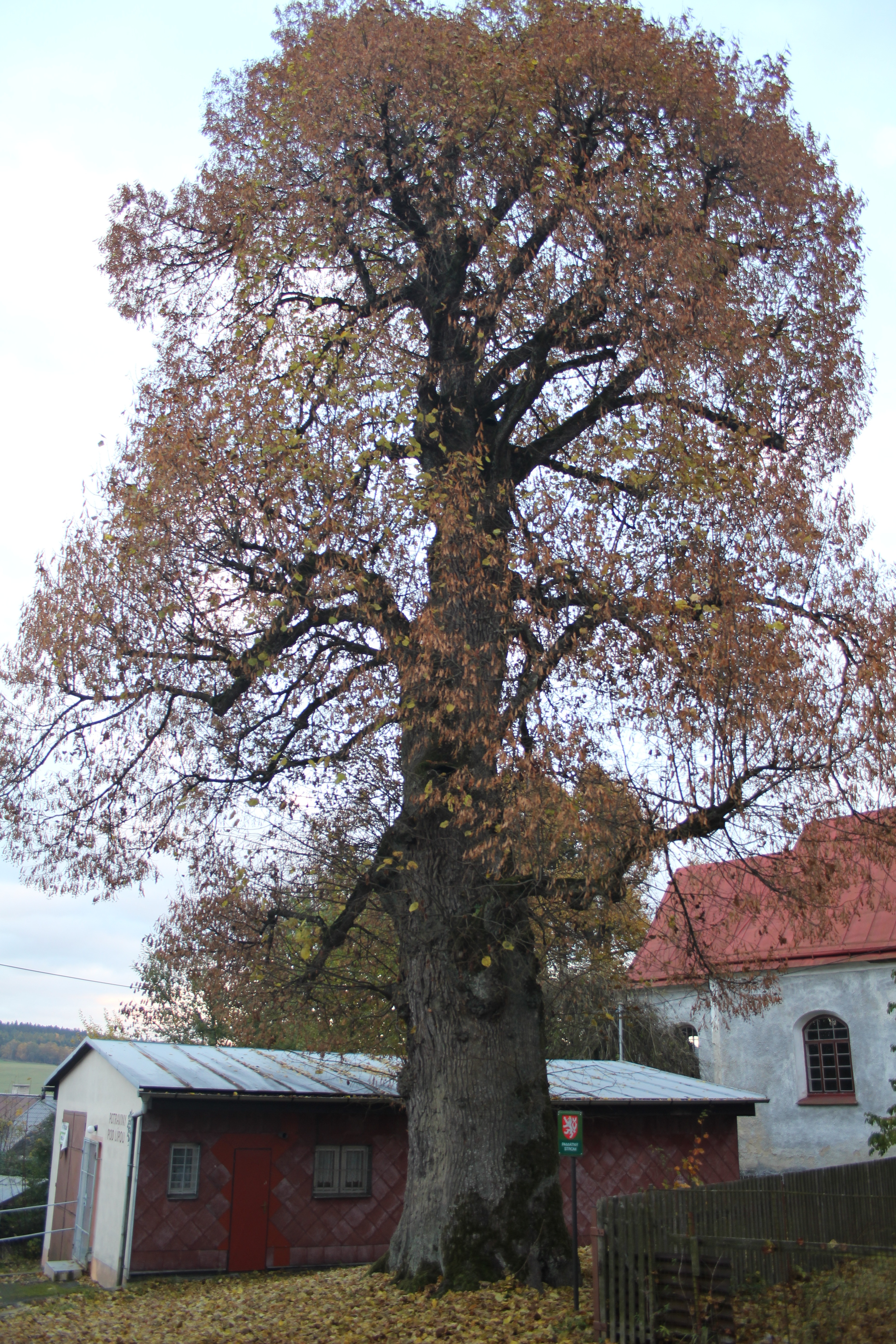 Památný strom asi 40 metrů severně od kostela